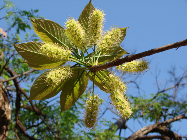 Terminalia argentea Mart. - COMBRETACEAE - Bosque do IBAMA - Brasília - Distrito Federal - Brasil.